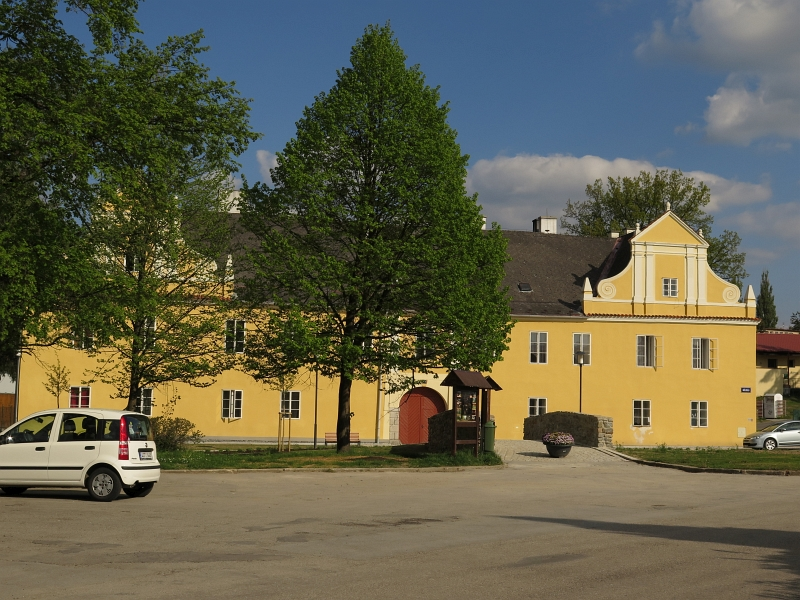 Starý pivovar, Bělidlo 101, Kaplice.